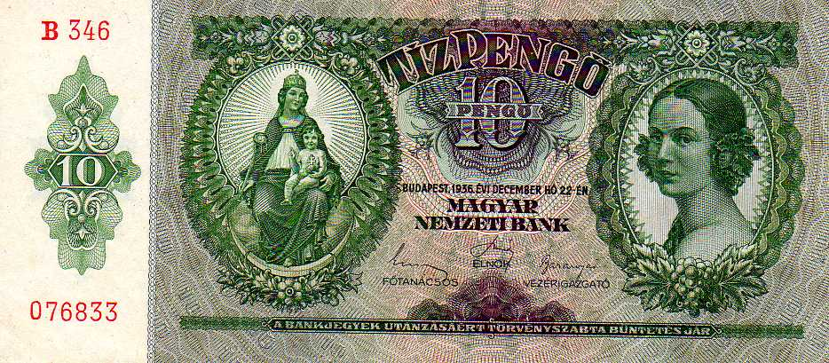 10 Hungarian pengő (1936) - obverse